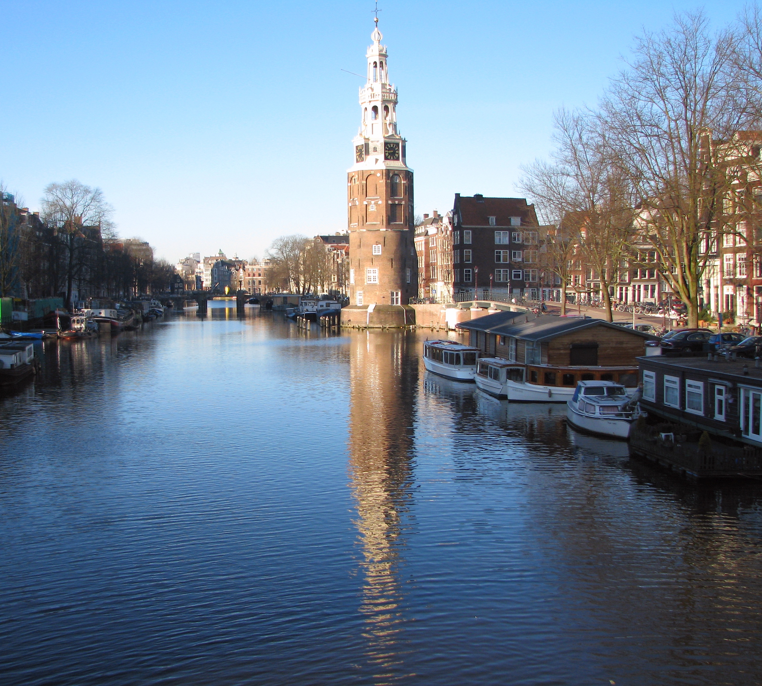 Der Montelbaanstoren an der Gracht Oude Schans dicht bei der Kikkerbils-Schleuse in Amsterdam, Niederlande. Foto Wolfgang Pehlemann IMG_2176